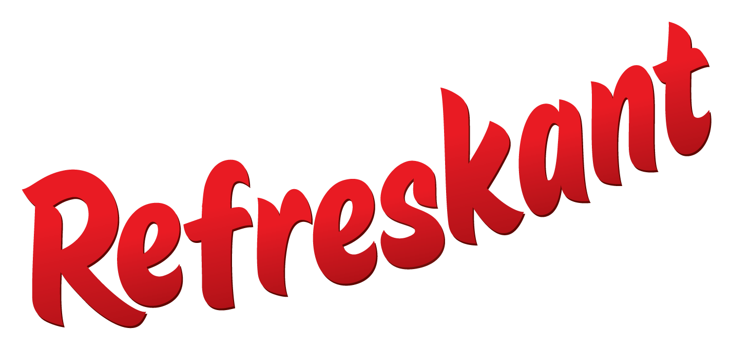 Refreskant